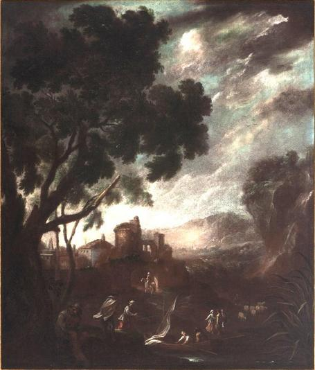 Paisatge de Gabriel Femenia. Representa un paisatge ideal, dramatitzat per un cel ennigulat. En el terç inferior es veuen escenes de pastors i al fons unes arquitectures més o menys reals. La natura protagonitza l´obra a la qual els personatges són secundaris i poc més que anecdòtics. El tractament de la llum és molt convencional, de certa efectivitat.